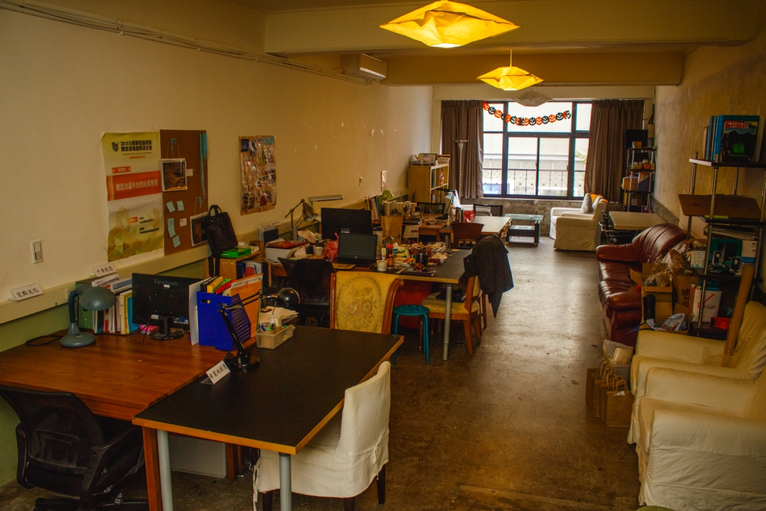 卡市達創業加油站武昌起義三樓工作空間，中華民國維基媒體協會曾經進駐此地。